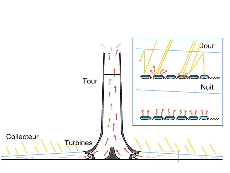 Dessin personnel décrivant le fonctionnement d'une Tour solaire.